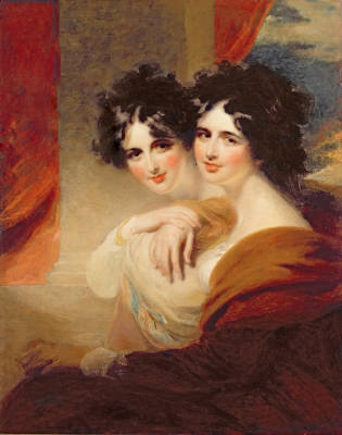 Анна Петровна (1777-1805) и Екатерина Петровна Лопухины (1783-1830)